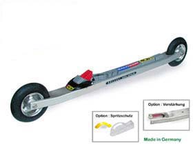 Skatingroller mit 100mm Gummiräder und ALU-Felge.